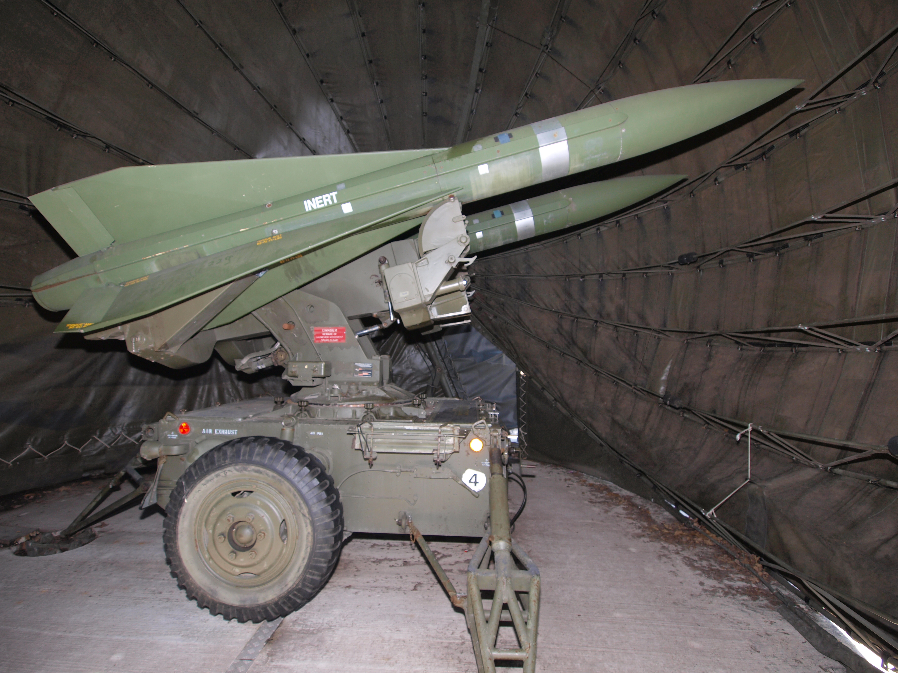 HAWK missile unit